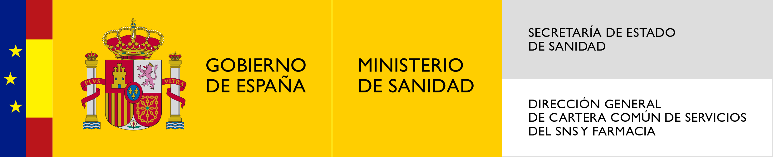 Logotipo de la Dirección General de Cartera Básica de Servicios del SNS y Farmacia